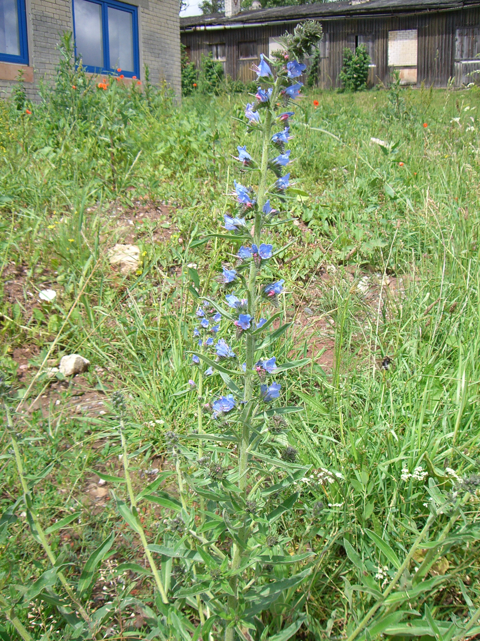 Natterkopf (gewöhnlich) (Echium vulgare)